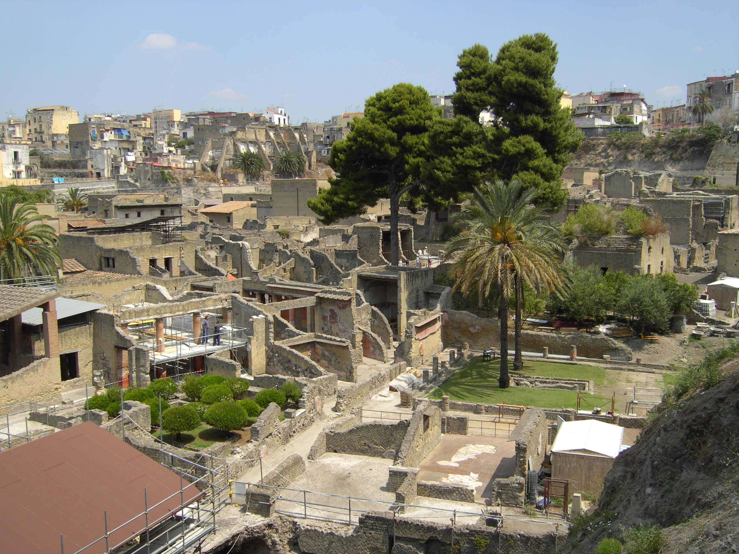 Herculaneum, Gesamtansicht der Ausgrabungen